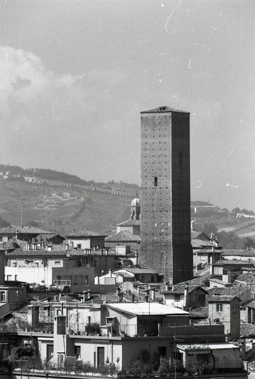 Servizio fotografico : Bologna, 1972 / Paolo Monti. - Strisce: 2, Fotogrammi complessivi: 11 : Negativo b/n, gelatina bromuro d'argento/ pellicola ; 35 mm. - ((Sul portanegativi: NIKMAT FP4. - Occasione: Campagna di rilevamento del centro storico. - Fonte: Agenda di Paolo Monti: Leica 1501-3000 Controllo numerazione (1950-1978), presso Archivio Paolo Monti